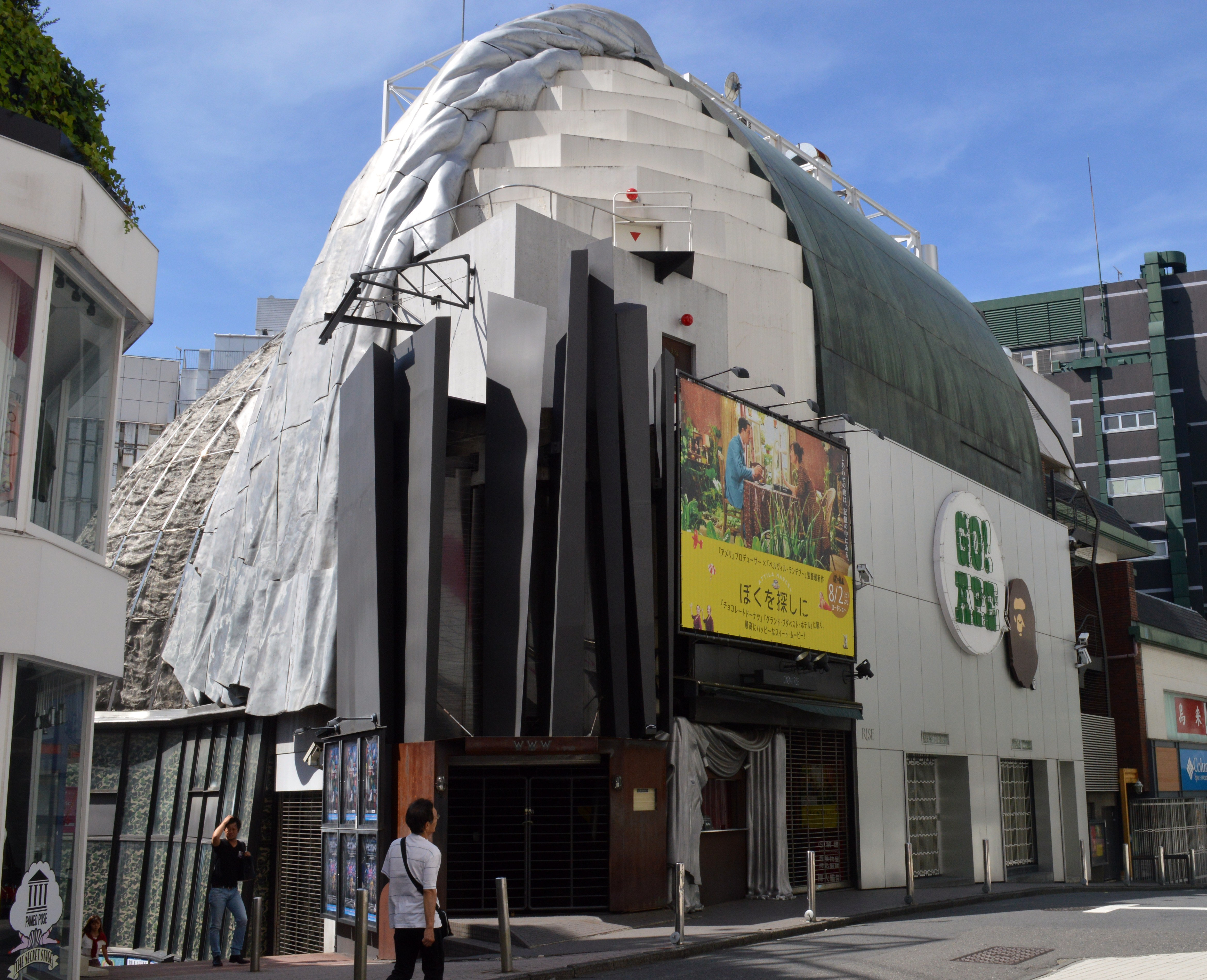 東京都渋谷区の映画館シネマライズ